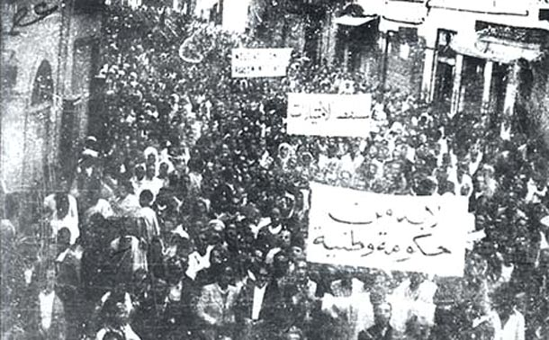 Manifestations populaires du 8 avril 1938 à Tunis prises par Habib Osman qui risque sa vie sur le toit d'un trolleybus. La photo est signée Osman (partie haute du côté gauche)